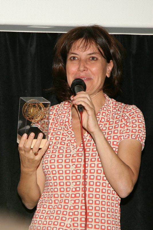 Sabina Guzzanti ritira il premio Brian istituito dall'UAAR al festival del Cinema di Venezia